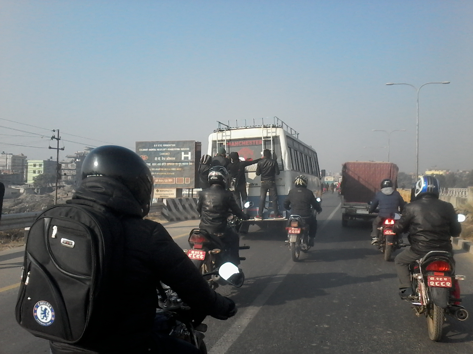 नेपाली: नेपालमा नाका बन्दीको असर